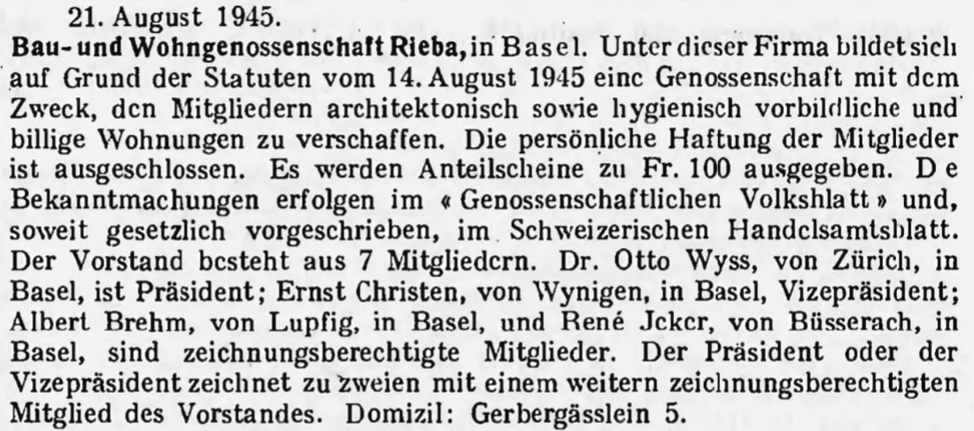 Publikation im Schweizerischen Handelsamtsblatt